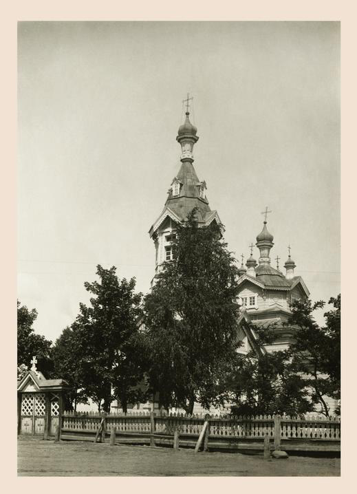 Беларуская (тарашкевіца): Вызна (Vyzna). Мікалаеўская царква-мураўёўка